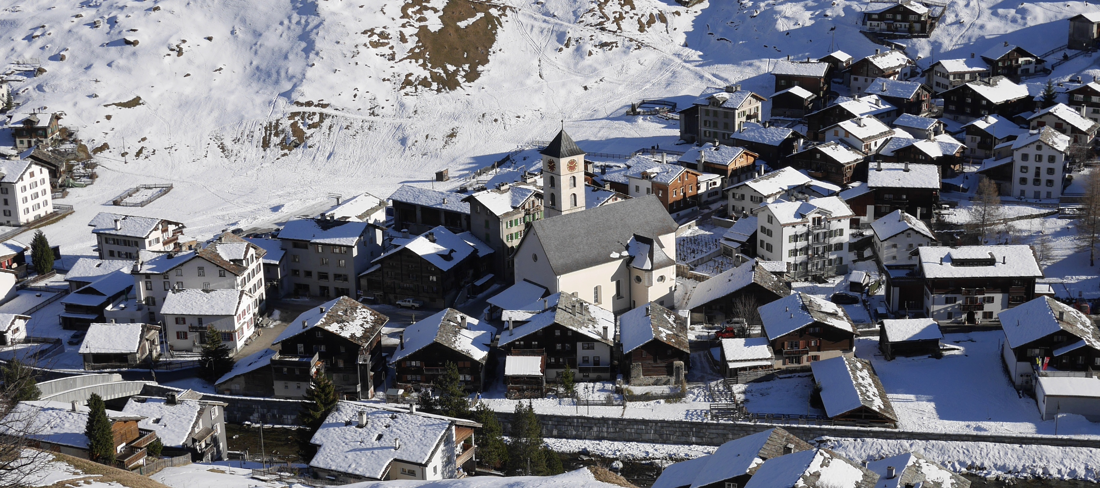 Vals, Graubünden, Schweiz